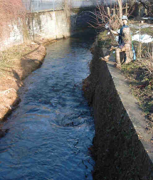 Angler am Rotbach in Mittelbiberach, Deutschland. Selbst Fotografiert am 07.01.2005, Lizenz GNU-FDL